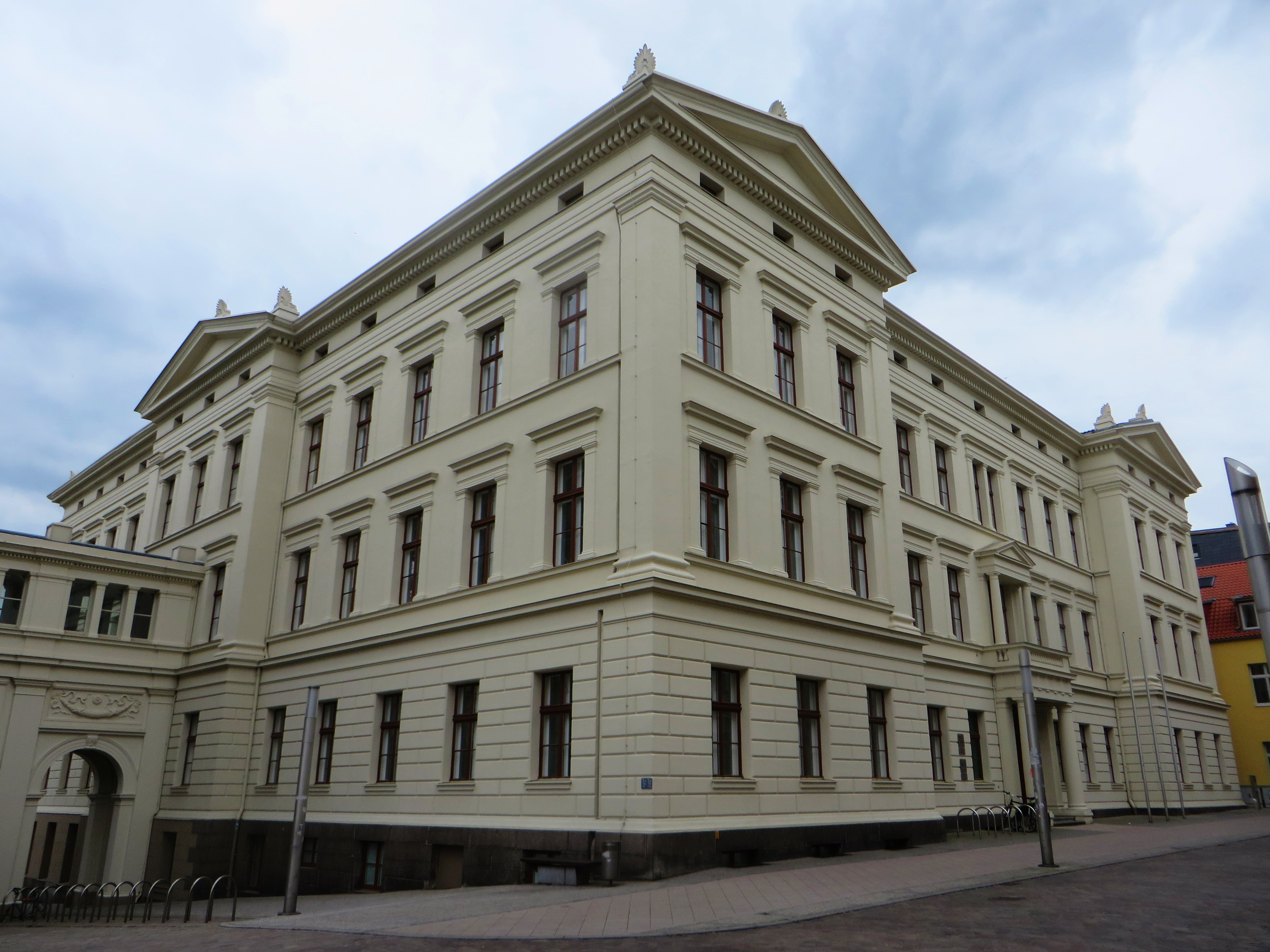 Im Kollegiengebäude II in der Landeshauptstadt Schwerin ist das Ministerium für Energie, Infrastruktur und Landesentwicklung des Landes Mecklenburg-Vorpommern untergebracht.